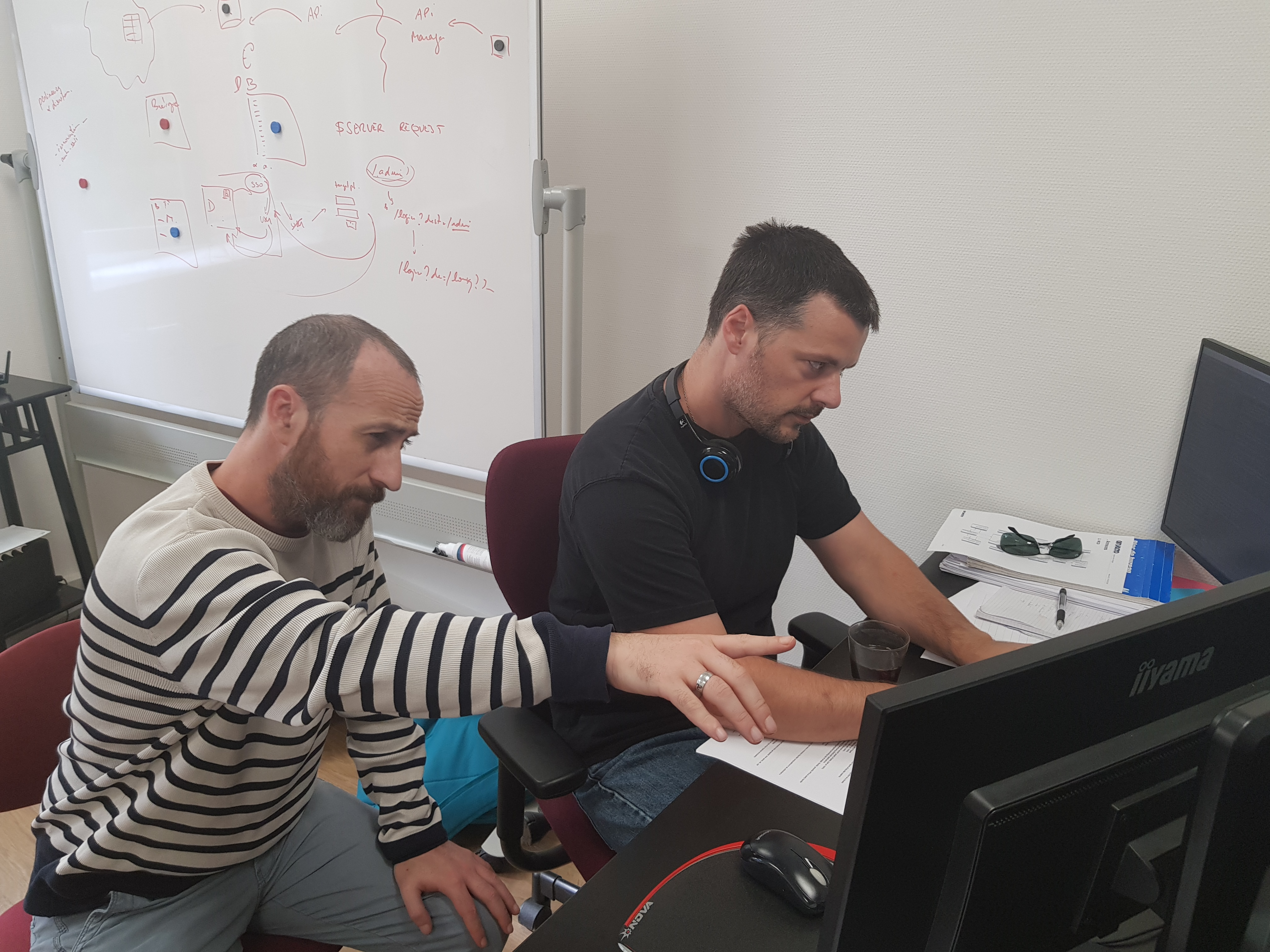 Deux développeurs utilisant la méthode de programmation en binôme